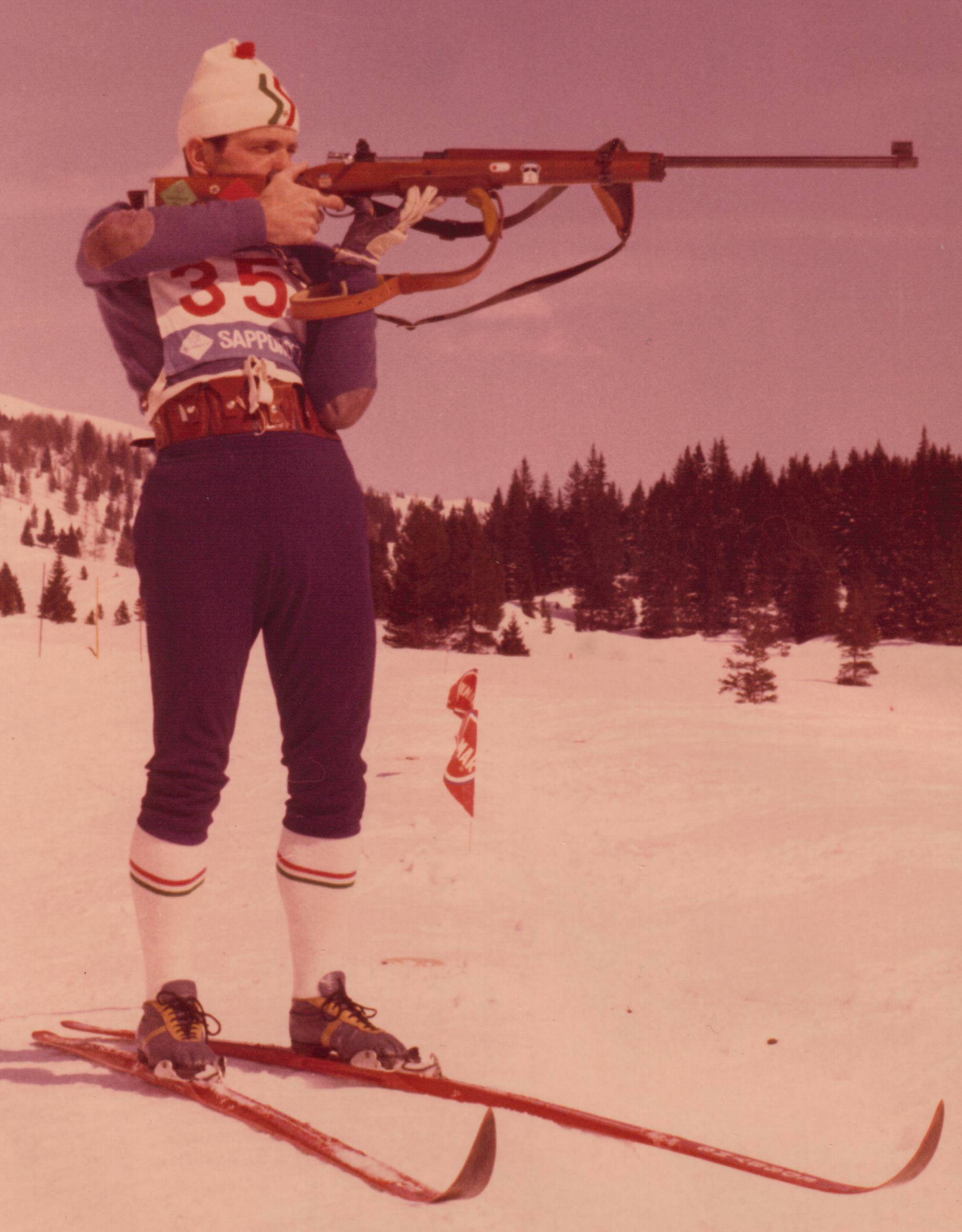 Fotografia di Giovanni Astegiano durante la gara di Zakopane.